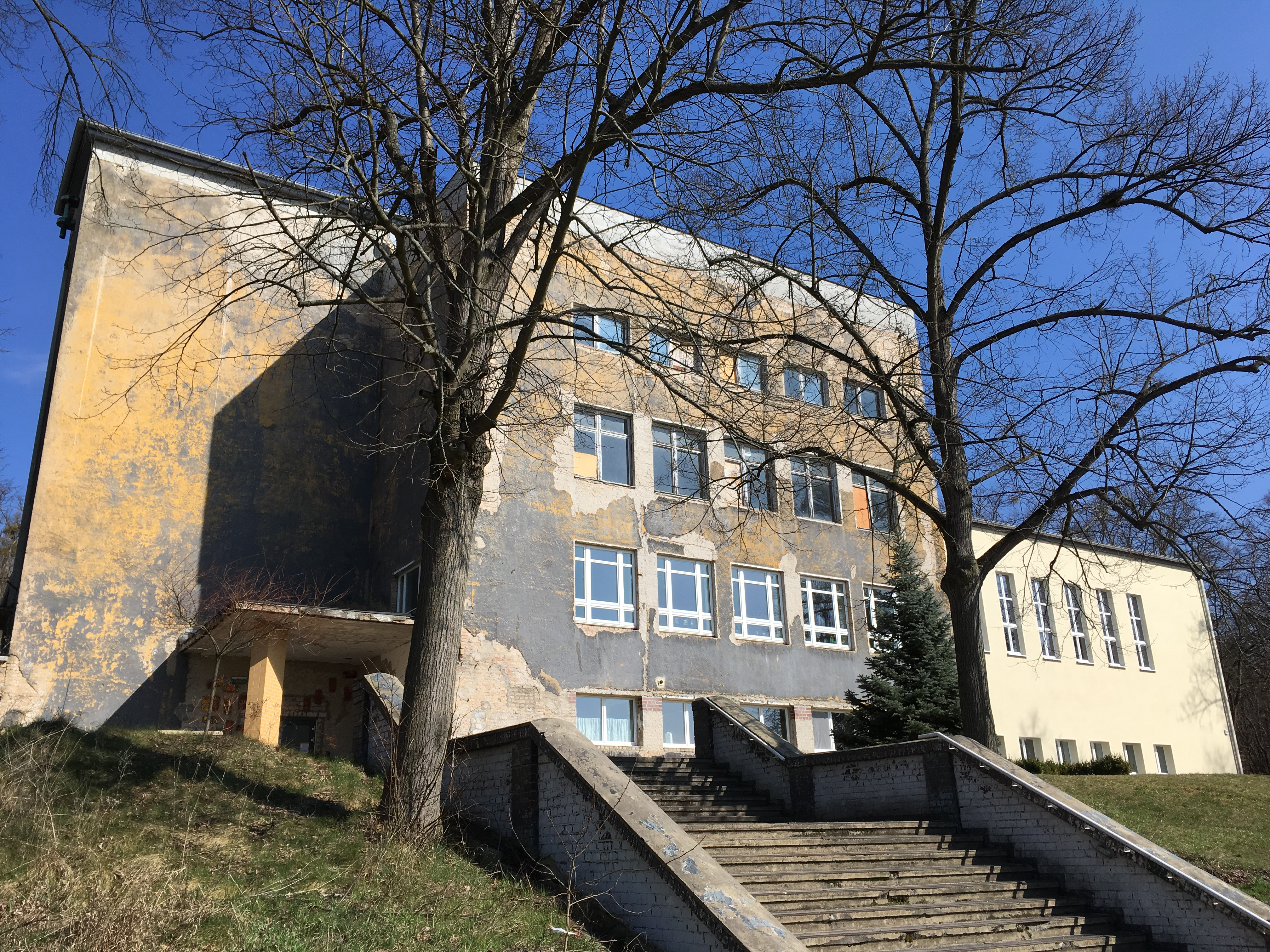 Friedensstadt Weißenberg im Trebbiner Ortsteil Glau